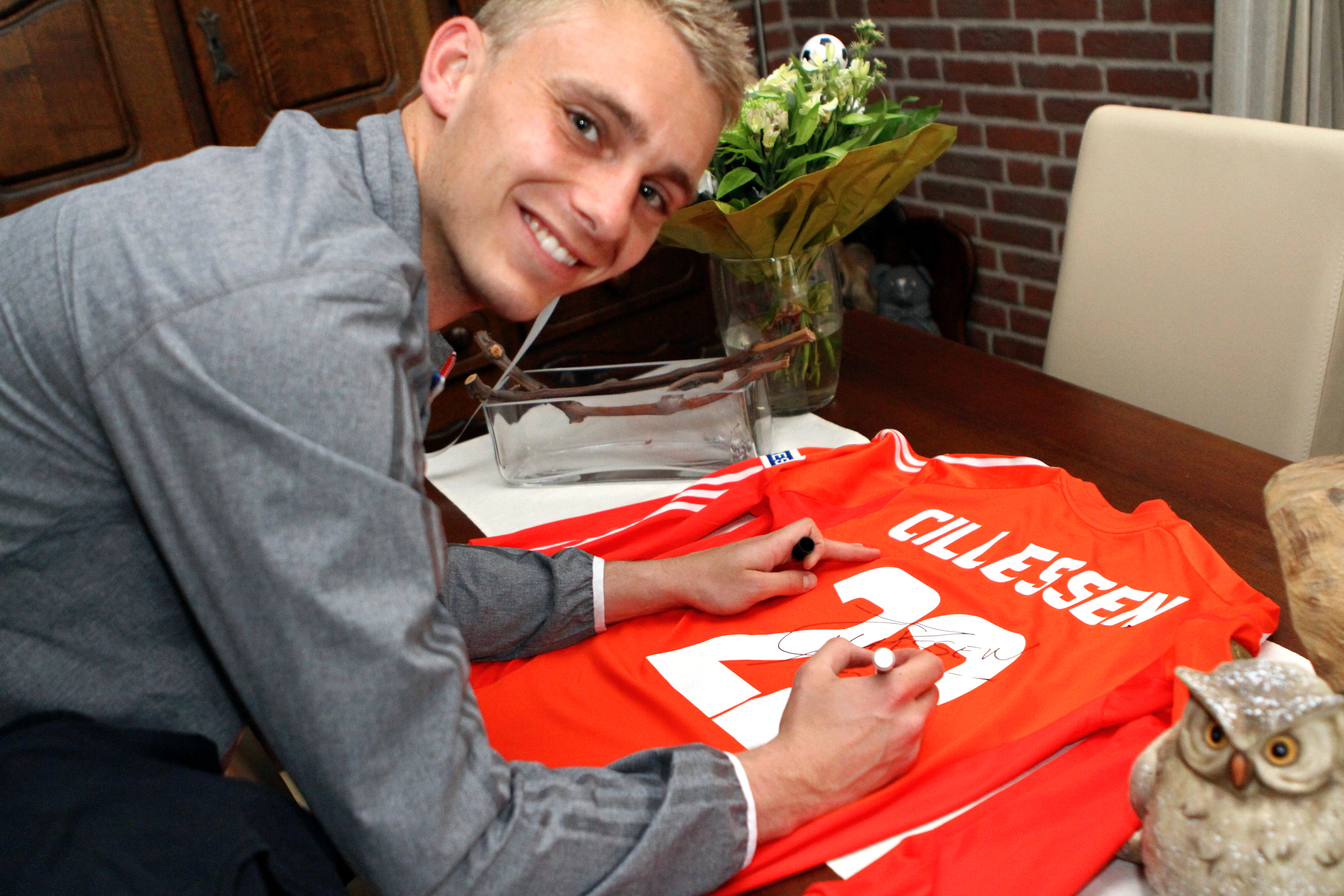 Jasper Cillessen signeert zijn wedstrijd shirt (AJAX) van PSV - Ajax 14 april 2013. Schenking een goede doel: Energy4All voor hun veiling tijdens footgolf toernooi van 17-22 juni 2013 te Nijmegen.